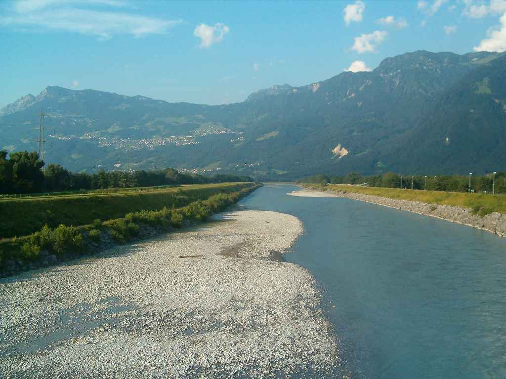 Liechtenstein határa